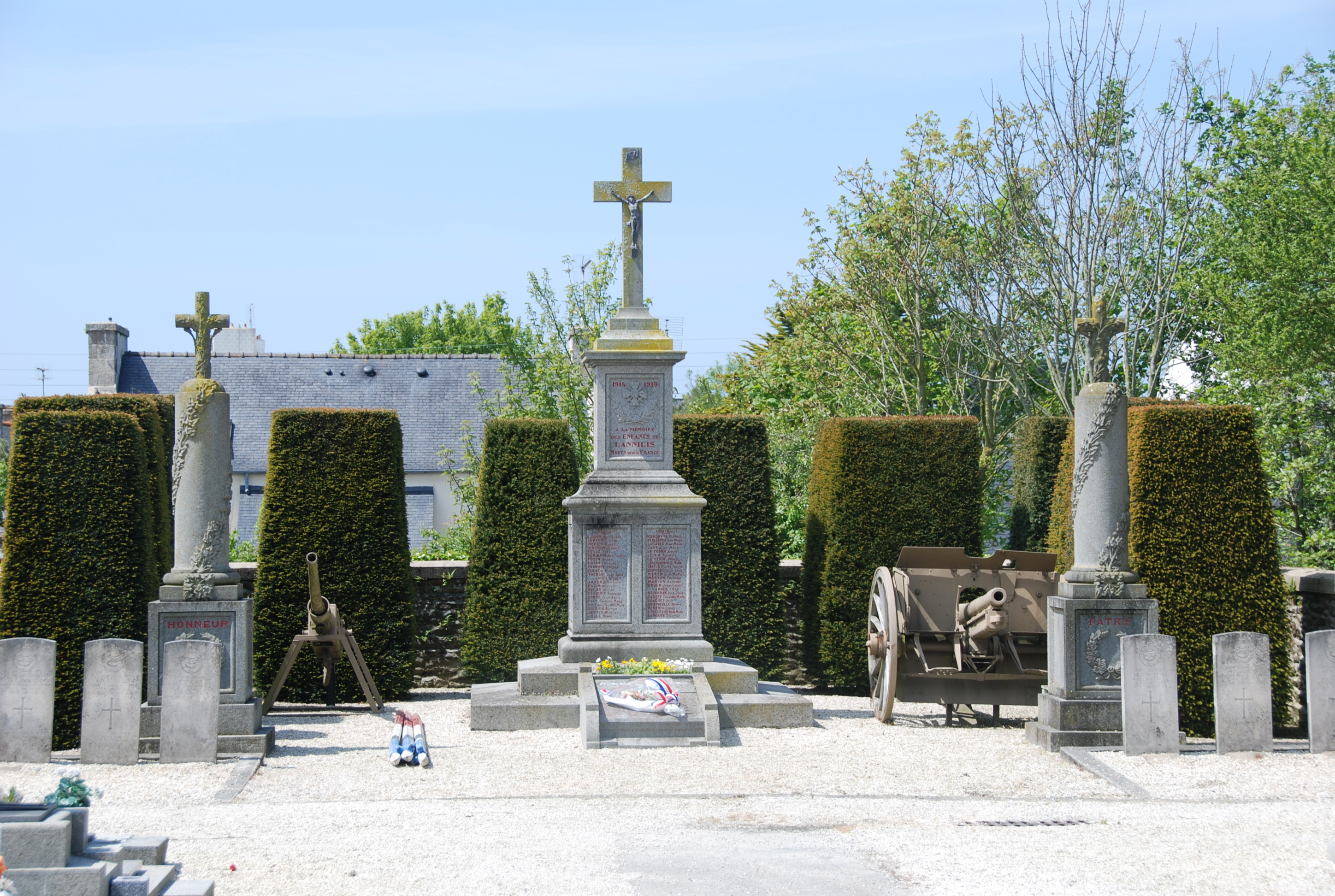 Monument aux morts - Lannilis-29